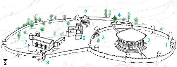 Kuskwam